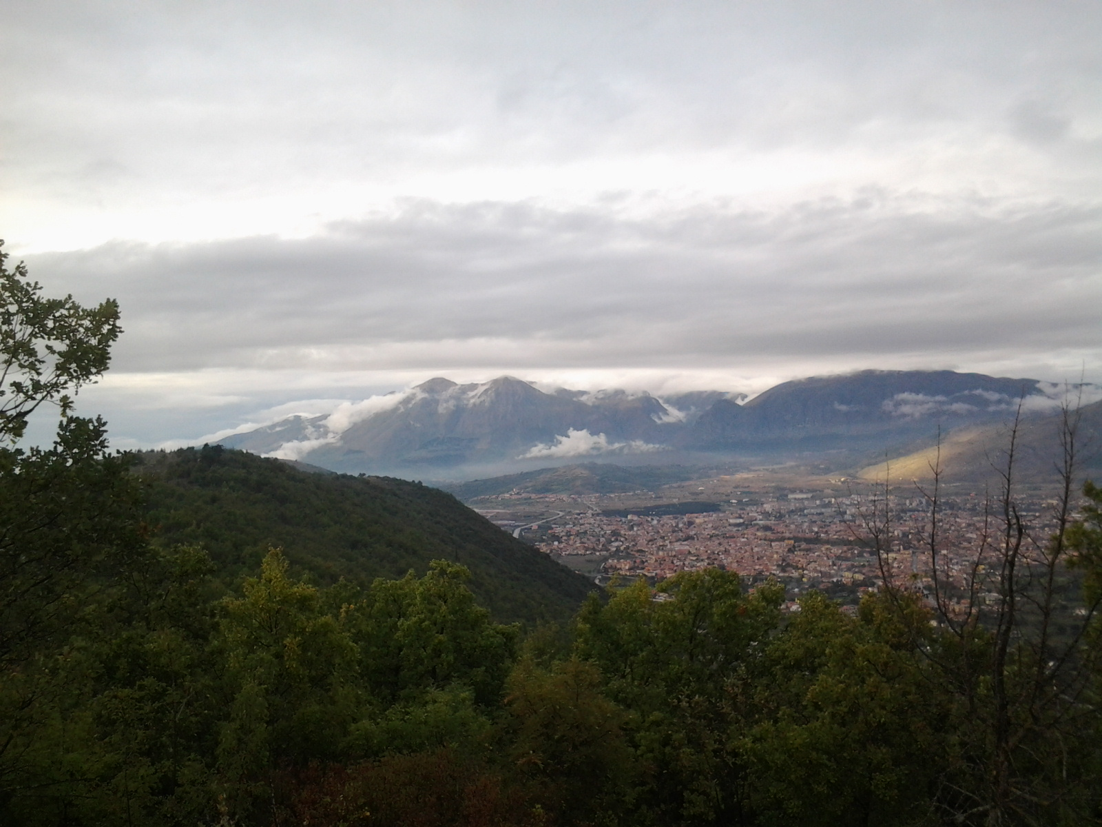 Panoramica di Avezzano e del monte Velino dalla via dei Marsi sul monte Salviano